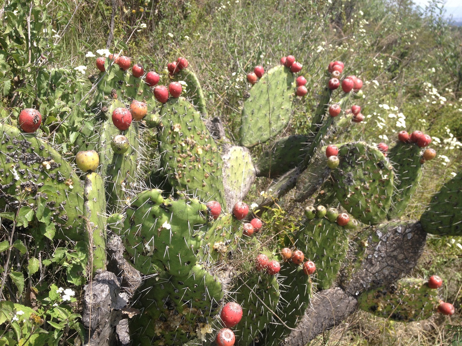 Opuntia depressa, el nopal rastrero o de monte, es una cactácea nativa del centro-sur y sur de México. Esta foto fue tomada en el Cerro Zapotecas, en Cholula, Pue., y se publicó en NaturaLista